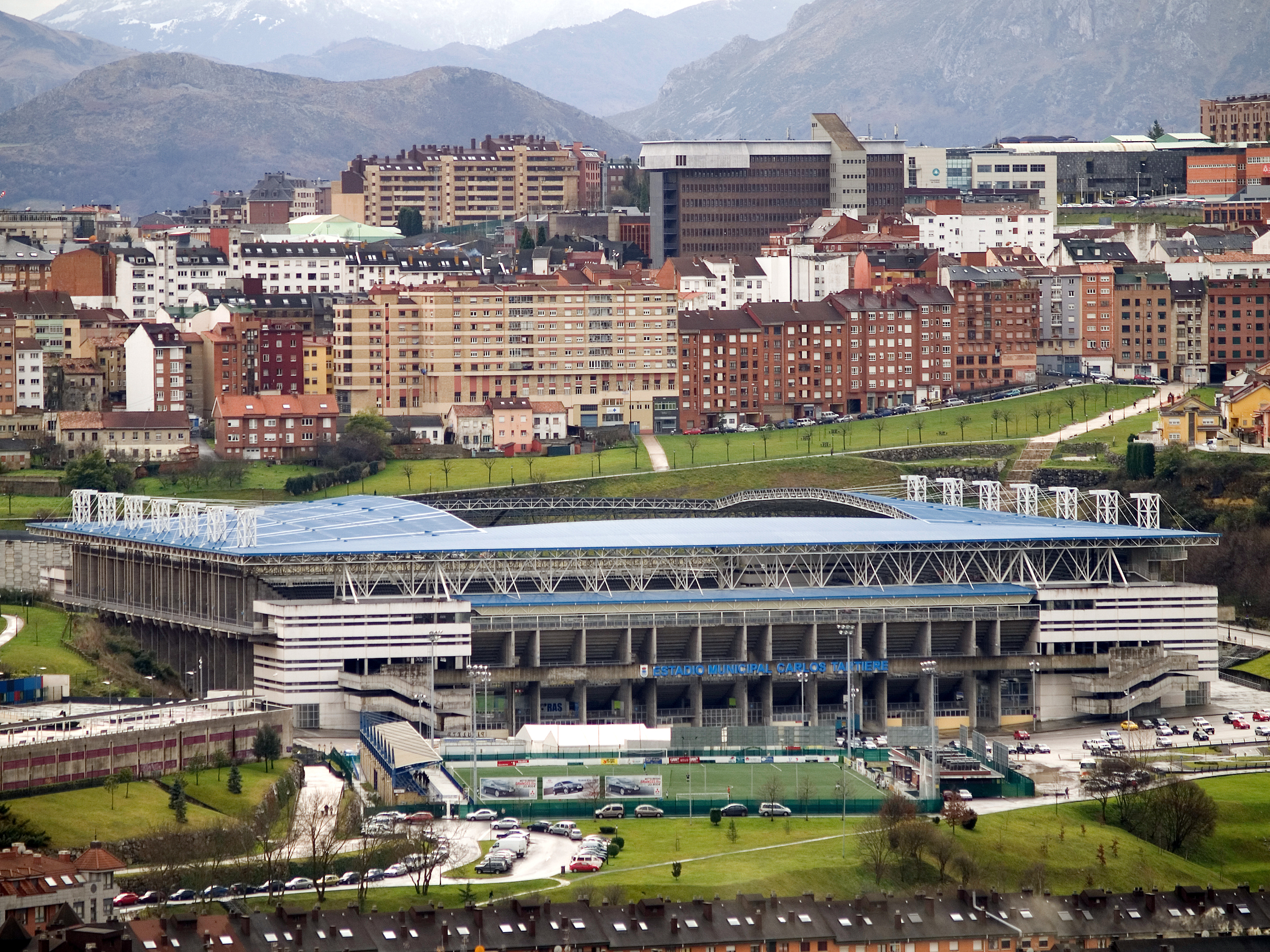 Estadio de fútbol del Real Oviedo S.A.D. (Asturias, España)